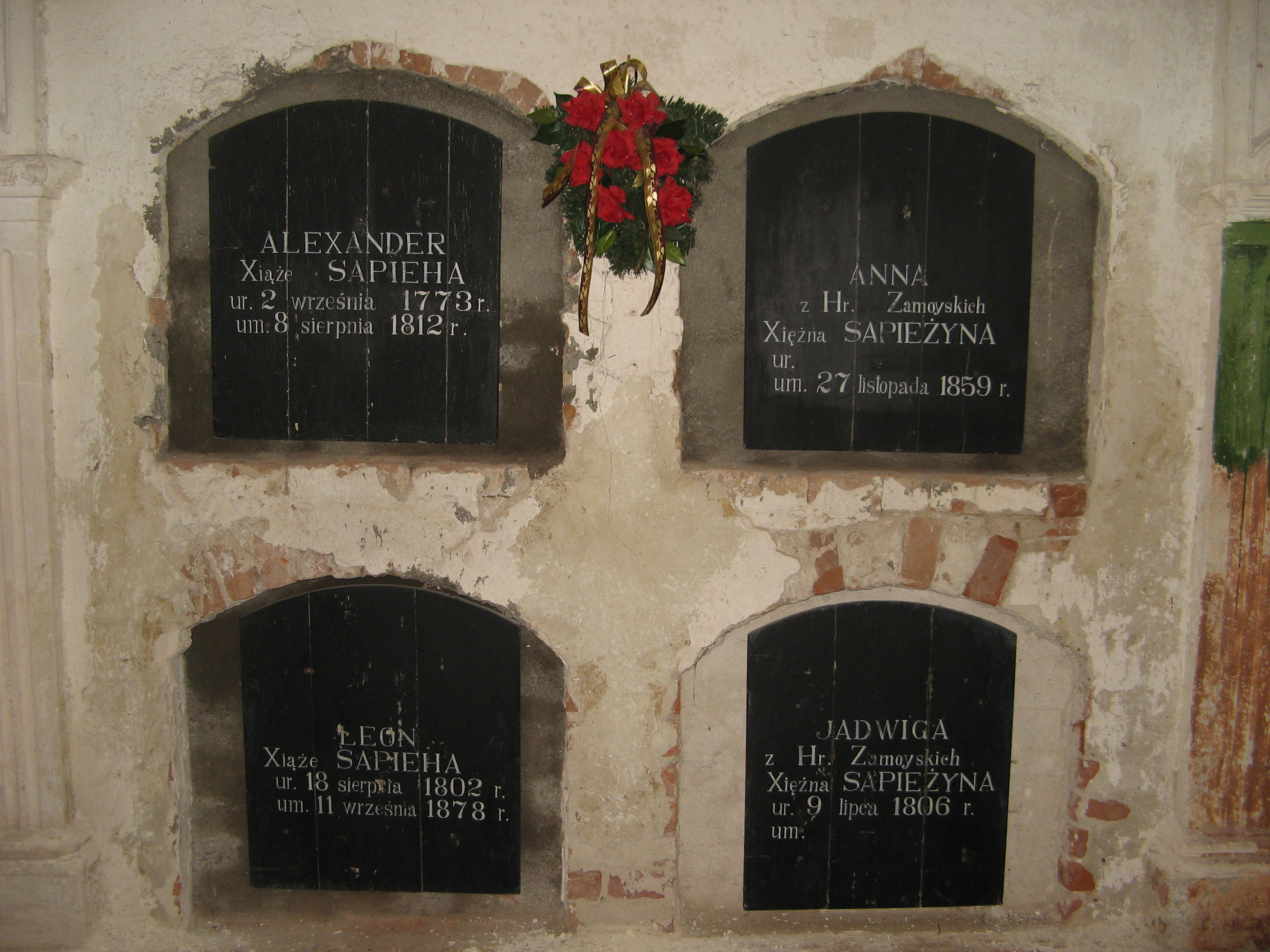 Grobowce w zamku w Krasiczynie.